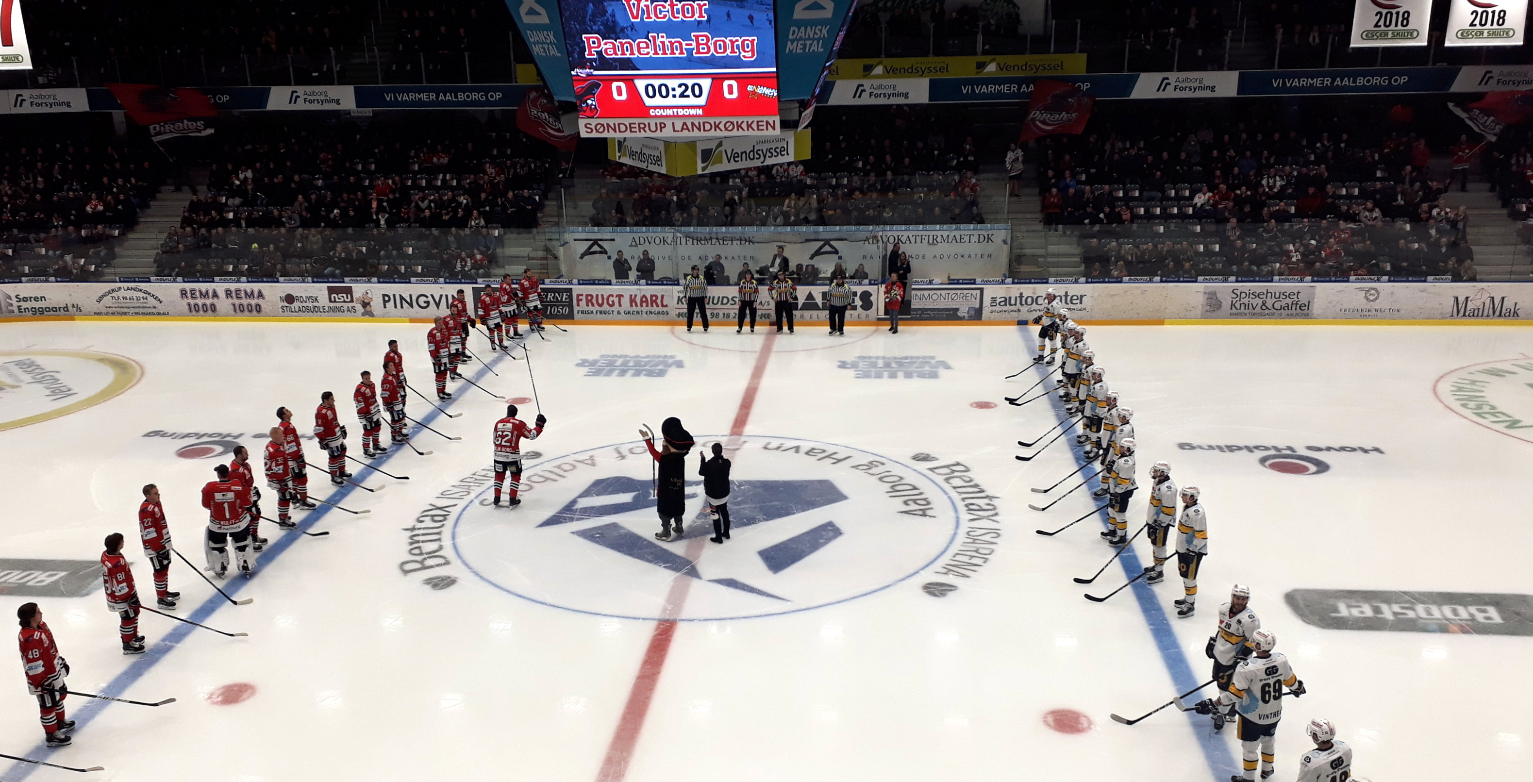 Ishockeykampen mellem Aalborg Pirates og Esbjerg Energy, Gigantium i Aalborg, 2019